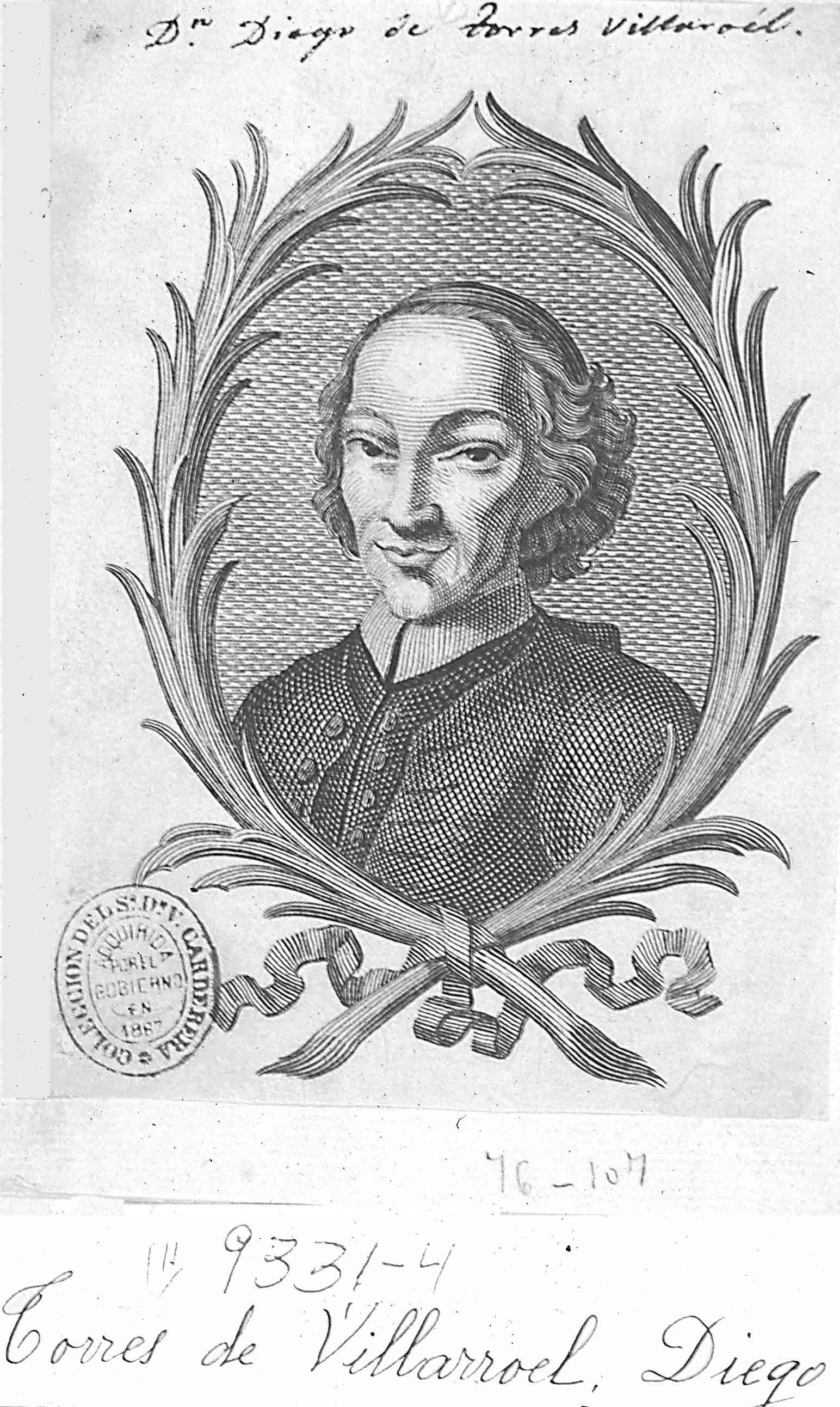 Retrato de Diego de Torres Villarroel